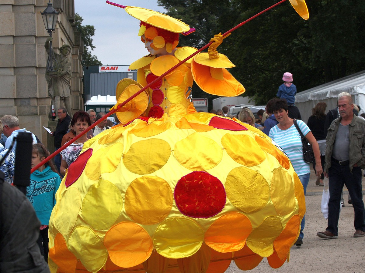 Kostümierte Stelzenläuferin (Sandra, Art Tremondo) beim Kleinen Fest im Großen Park, Ludwigslust. Kostüm: digaudi/Sol [1]